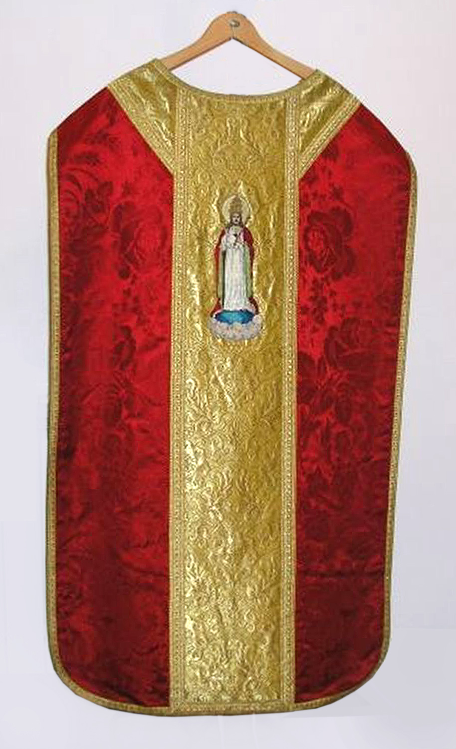 Ornat skrzypcowy czerwony.